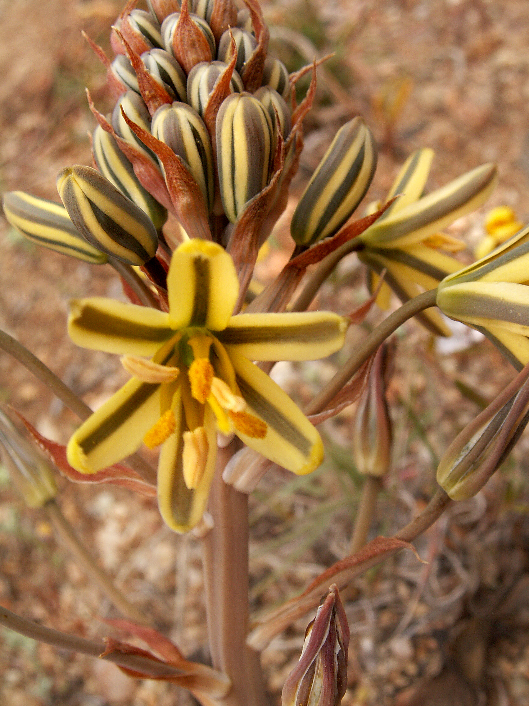 Milchstern (Ornithogalum suaveolen Jacq.), Richtersveld-Nationalpark, Nordkap, Südafrika